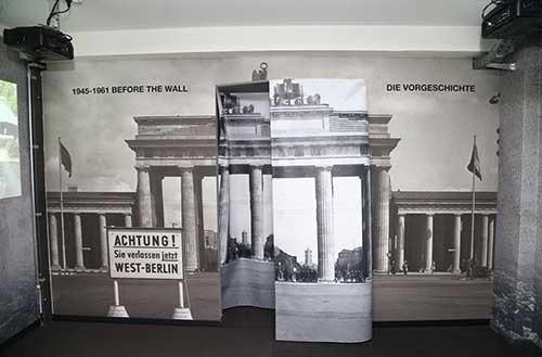 Muzeul zidului berlinului la intrarea intr-o camera din muzeu